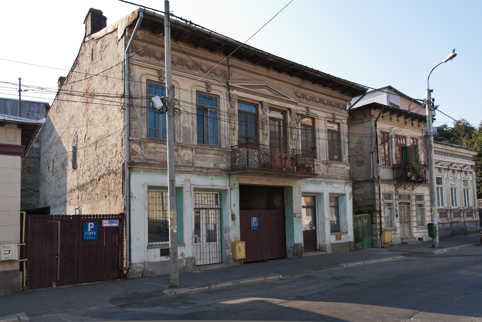 Fotografia prezintă Casa Dogaru, văzută dinspre NV. În partea dreapta a cadrului se poate vedea și casa negustorului Agate Raiciu Vasiliu (monument istoric).